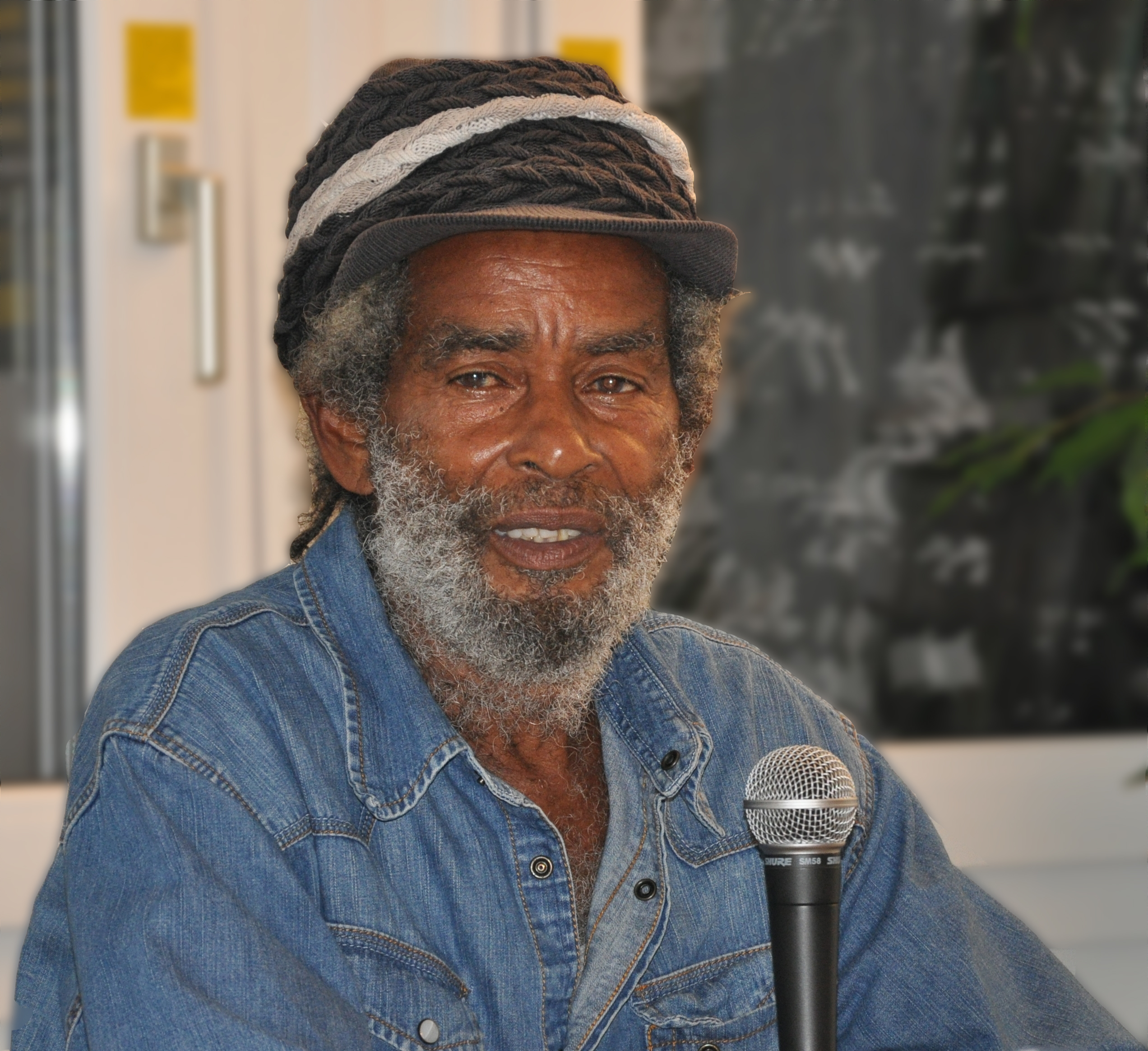 Max Romeo bei der Pressekonferenz auf dem Summerjamfestival